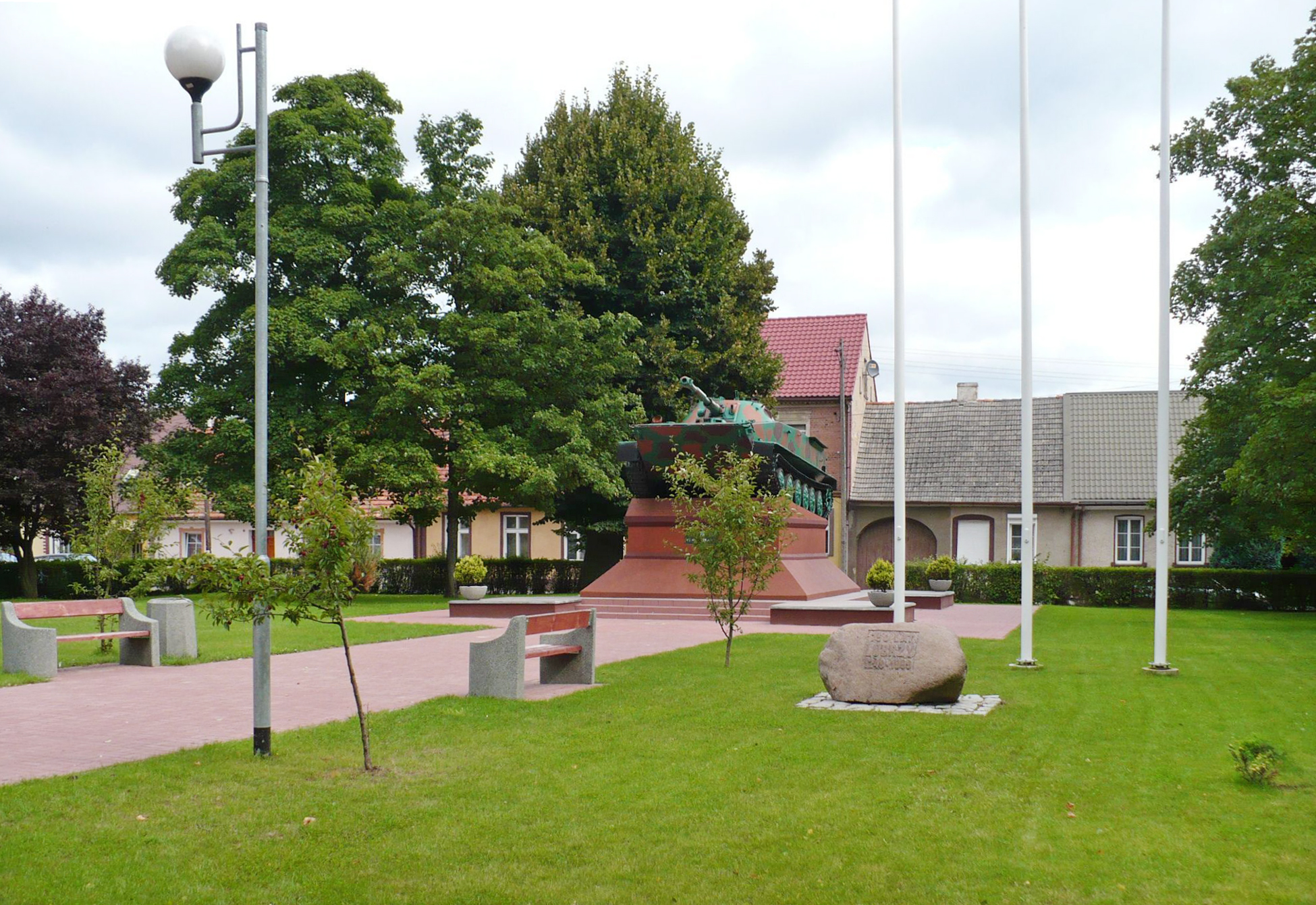 Rynek w Lubrzy, sierpień 2008